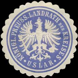 Sealing stamp Title: K.Pr. Landrath des Kreises Uslar Description: blau, weiß, geprägt Place: Uslar size: 4 cm